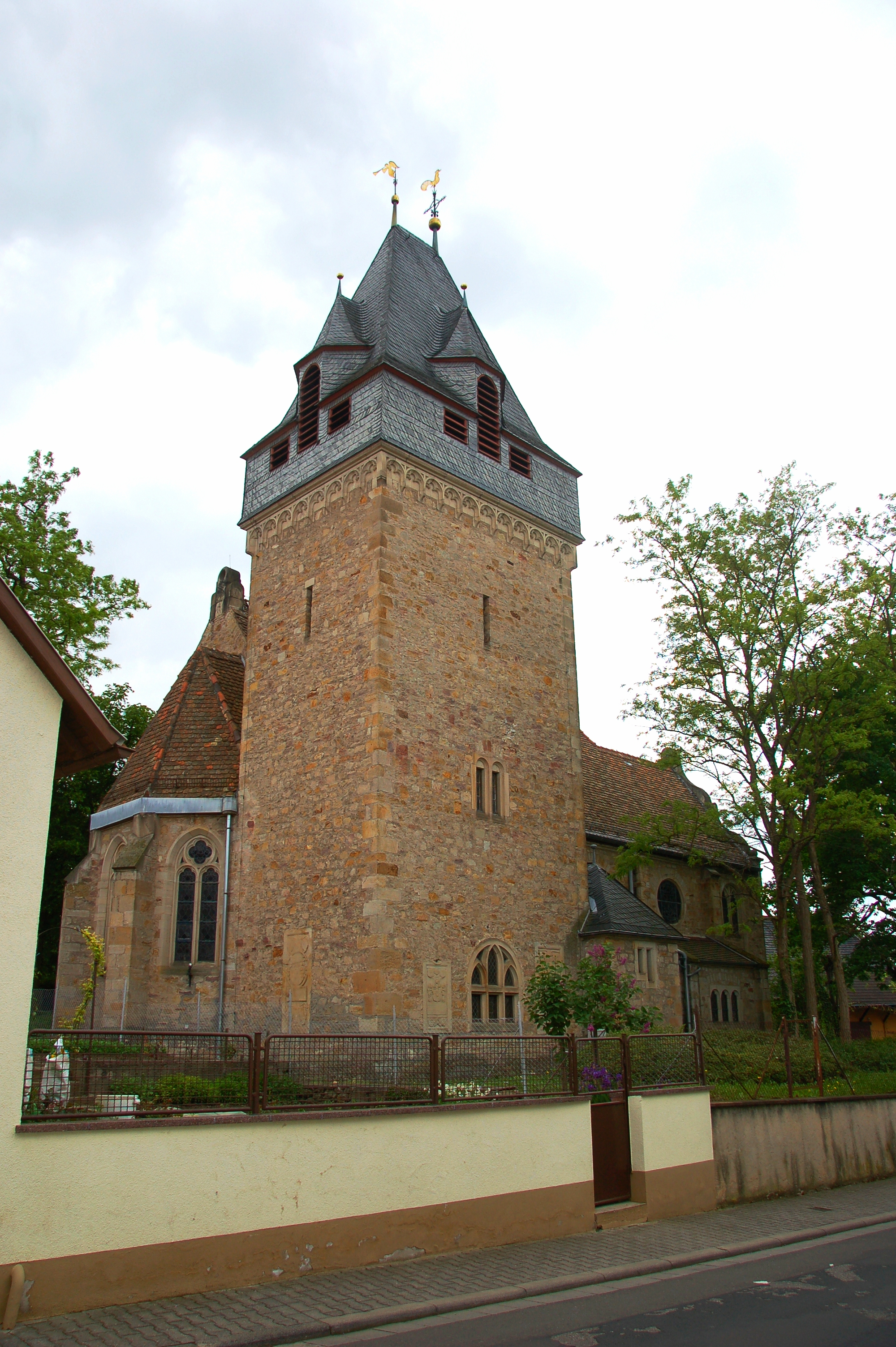 Dreischiffiger späthistoristischer Bruchsteinbau, 1903/04, Architekt Ludwig Hofmann, Herborn, teilweise mit spätgotischen und barocken Mauerteile und im Kern mittelalterlichem Chorflankenturm. Barockportal im Westen, bezeichnet 1749. Von der alten Kirche ist noch das spätgotische Sakramentshaus erhalten. Die Orgelbauerfamilie Stumm errichtete 1775 die Orgel der Kirche.